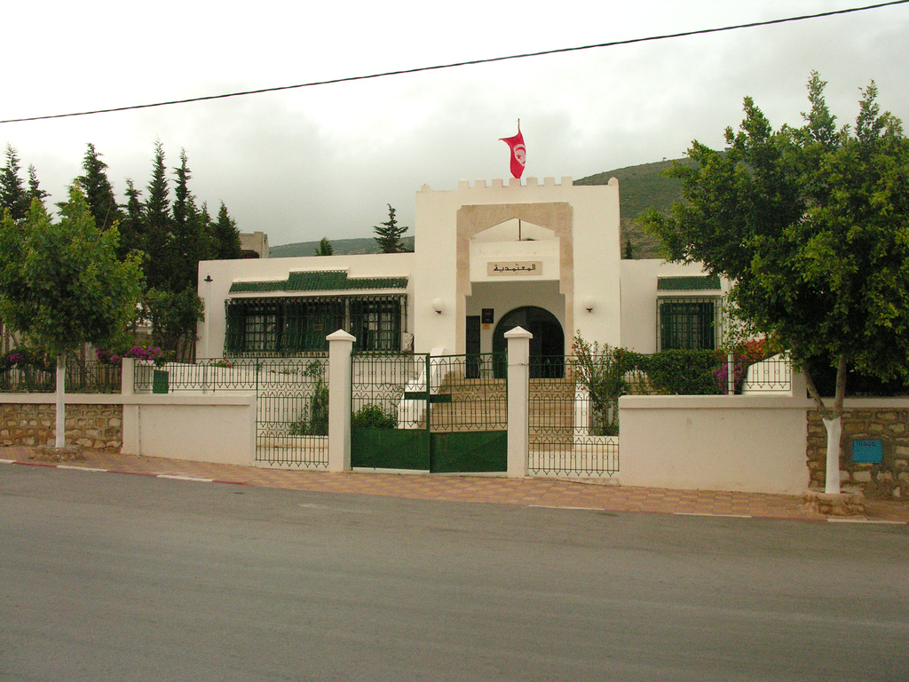 Siège de la délégation de Ghar El Melh, Ghar El Melh, Tunisie